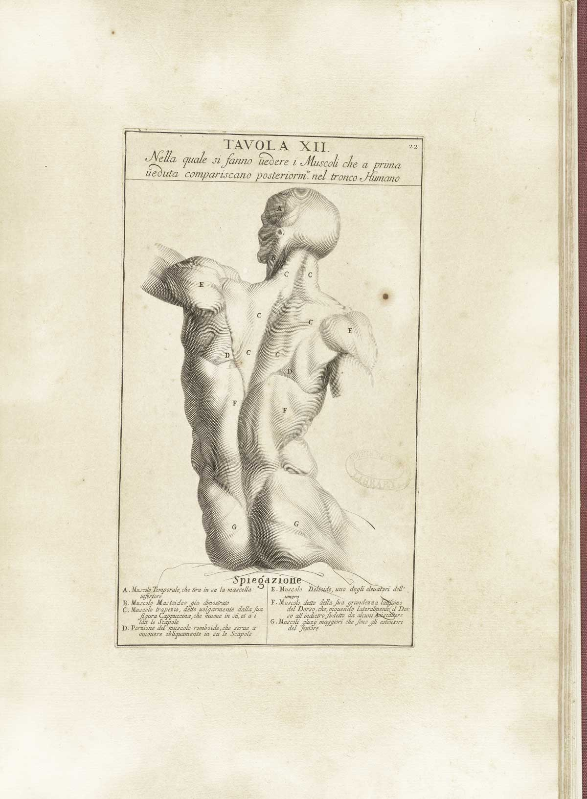 Genga: Anatomia per uso et intelligenza del disegno ricercata non solo su gl'ossi, e muscoli del corpo humano